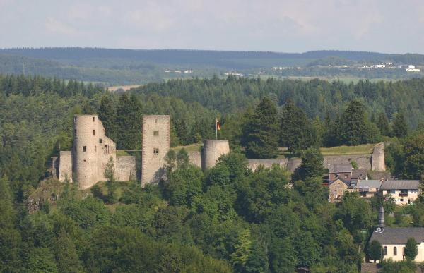 Burg Schönecken im Juni 2005